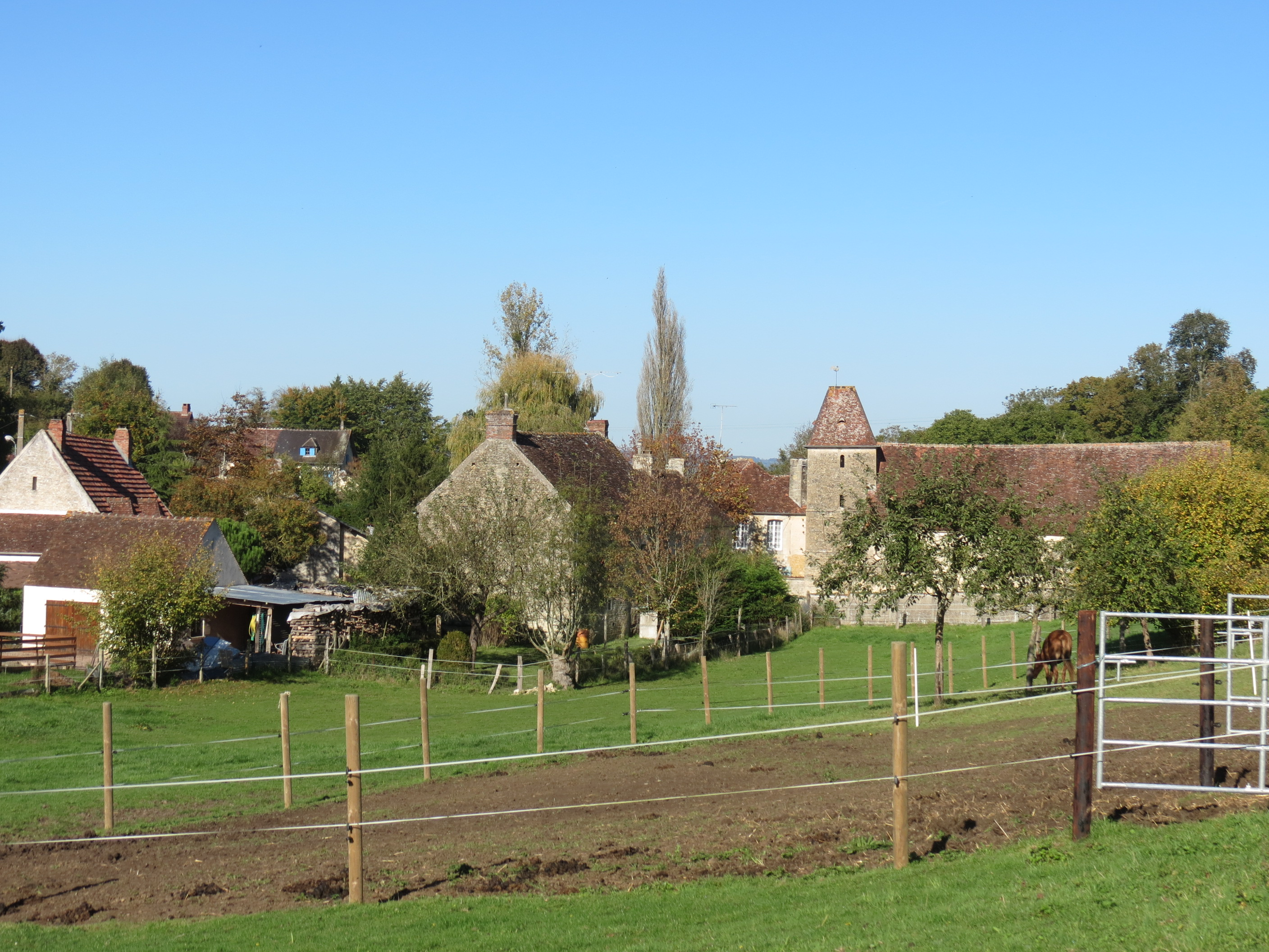 BourgStLeonard